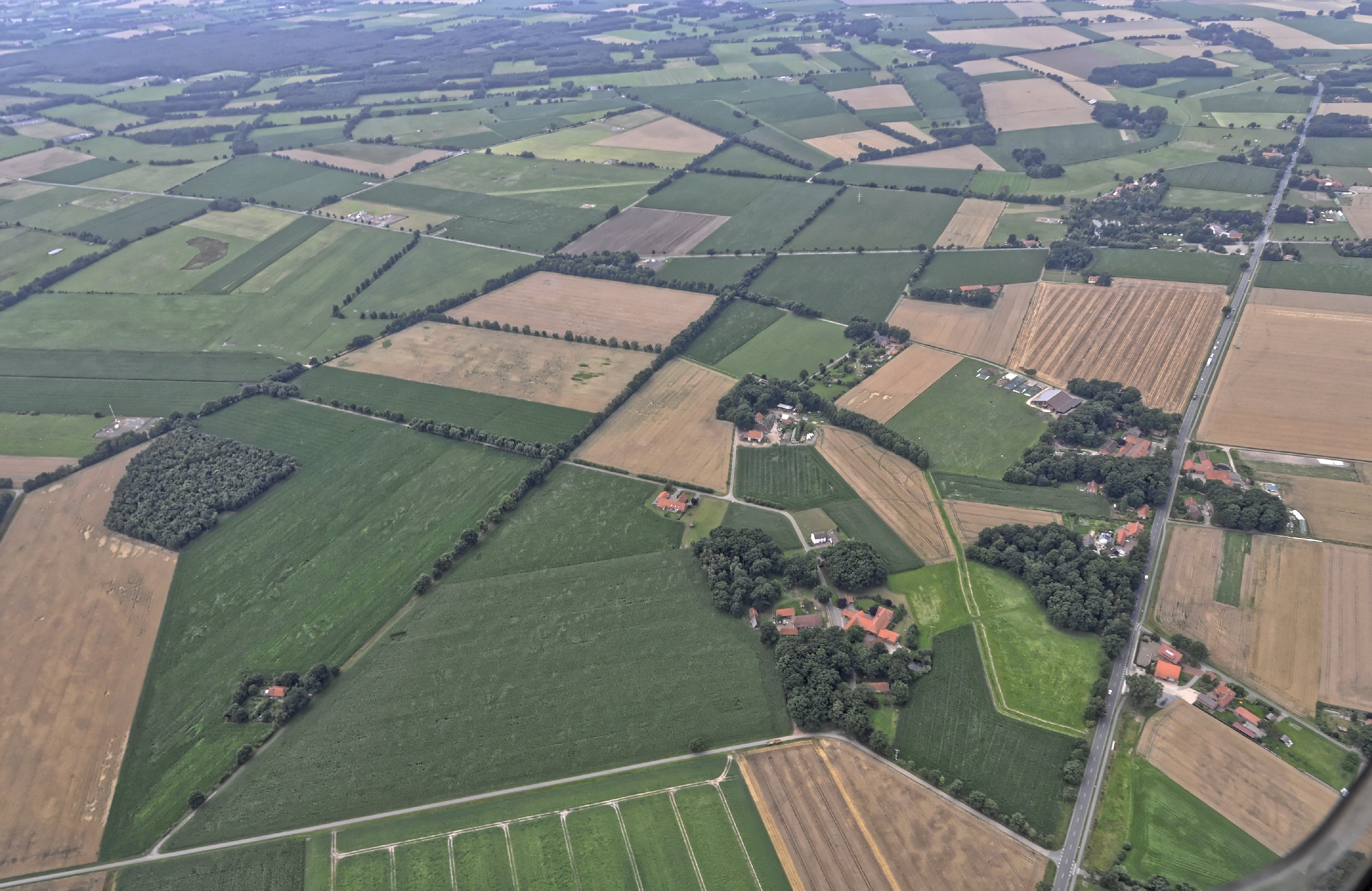 Bilder vom Flug Nordholz-Hammelburg 2015: Blick von Osten entlang der B 214 auf zu Maasen gehörende Weiler.